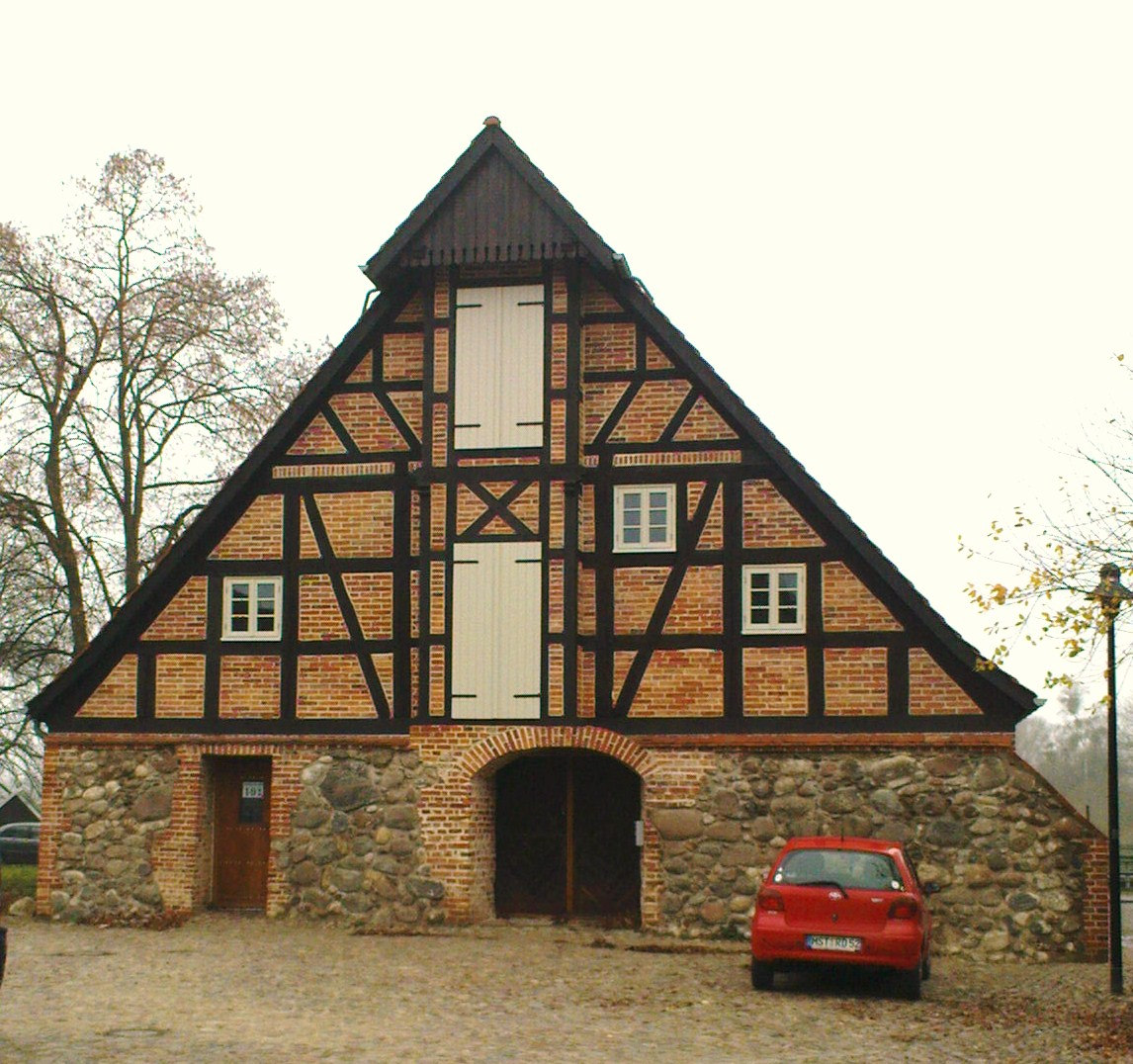 Fachwerkgiebel der Wassermühle in Friedland